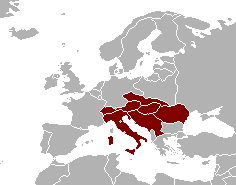 In evidenza, le nazioni i cui club hanno preso parte alla Coppa Mitropa (o Coppa dell'Europa Centrale) nel suo periodo "classico", ovvero dalla fondazione sino alla seconda guerra mondiale.